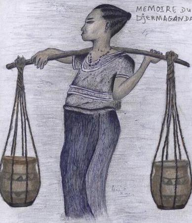 Tagalé, systeme de transport les odjets lourds par les femmes Zarma du Zarmaganda. cette femme est tressé en mode Kanbe Banda ou Kabe Benda, selon les dialectes zarma.